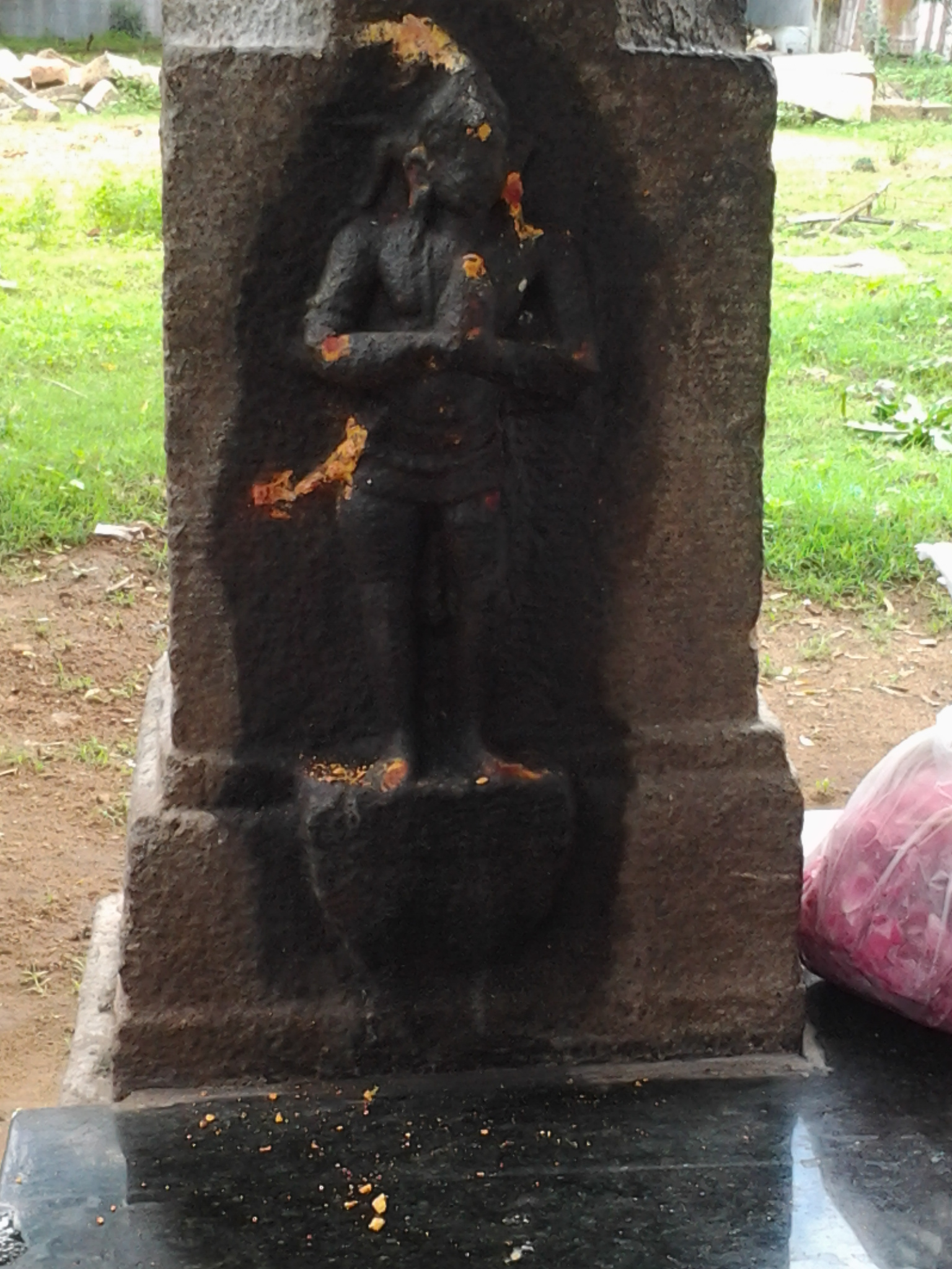 தென்காசி பாண்டியர்களின் குல குருவான விந்தையர் சித்தரின் சமாதி. குருவை வணங்கி நிற்கும் சடையவர்மன் பராக்கிரம பாண்டியன்.